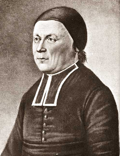 L'abbé Antoine Gapp (1766-1833), curé de Hottviller, fondateur de la Congrégation des Soeurs de la Providence de Saint-André